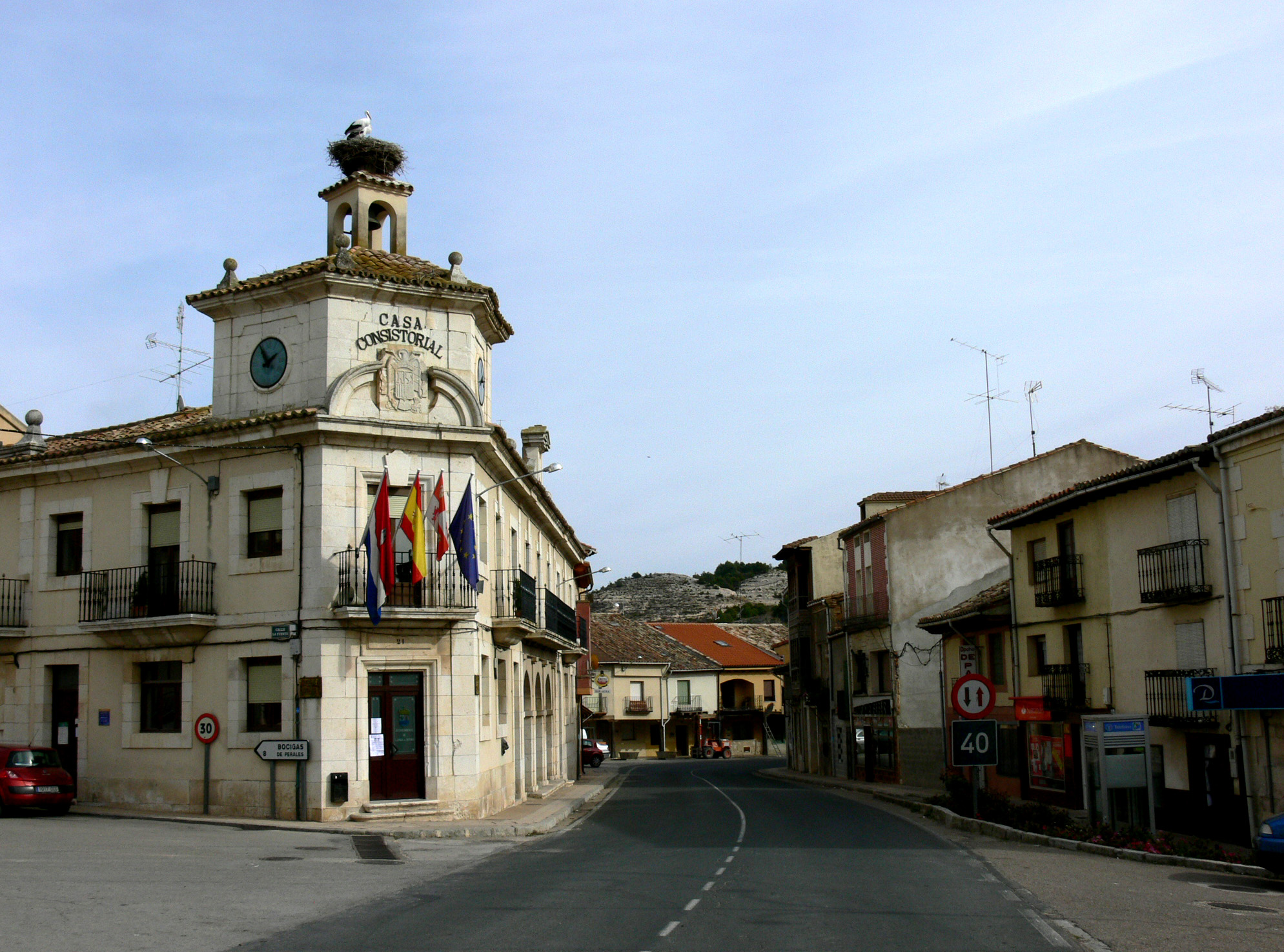 Langa de Duero, Soria - España.